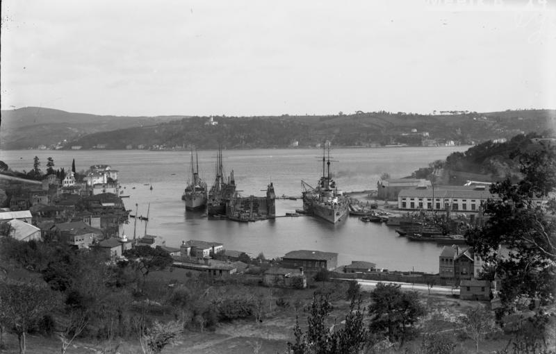 Stenia, Bosporus, Kreuzer Goeben Goeben, Großer Kreuzer Stapell.: 28.3.1911 "Goeben" in der Steniawerft (vor 1917) Bosporus vor der Werkstatt rechts das desarmierte Kanonenboot "Kubanez" als Mutterschiff des Bergeverbandes [Großer Kreuzer Goeben in Stenia, an der europäischen Seite des Bosporus]